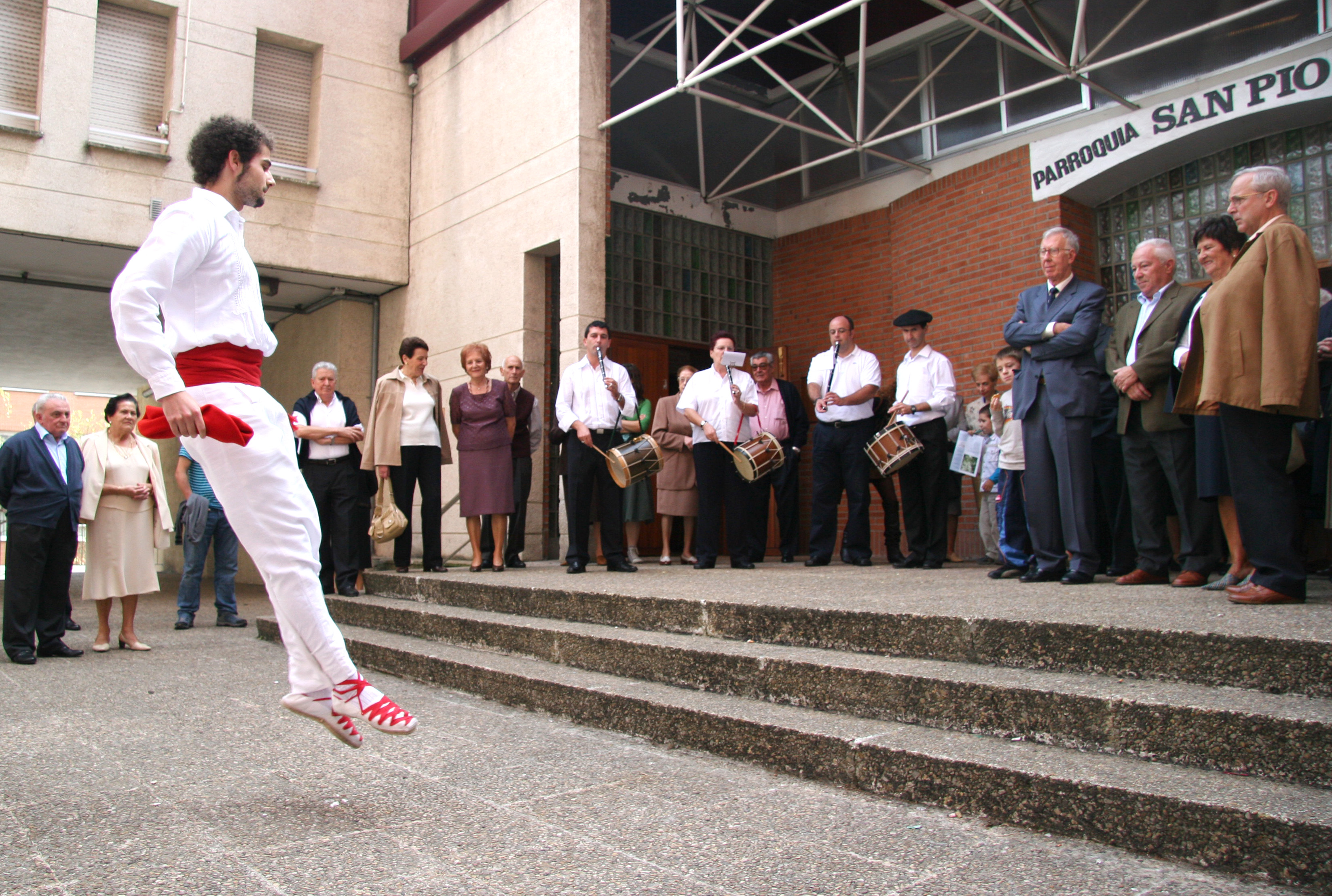 Dancer perfoming an Aurresku2006-10-29_Ipuruako-jubilauak-IZ_6450